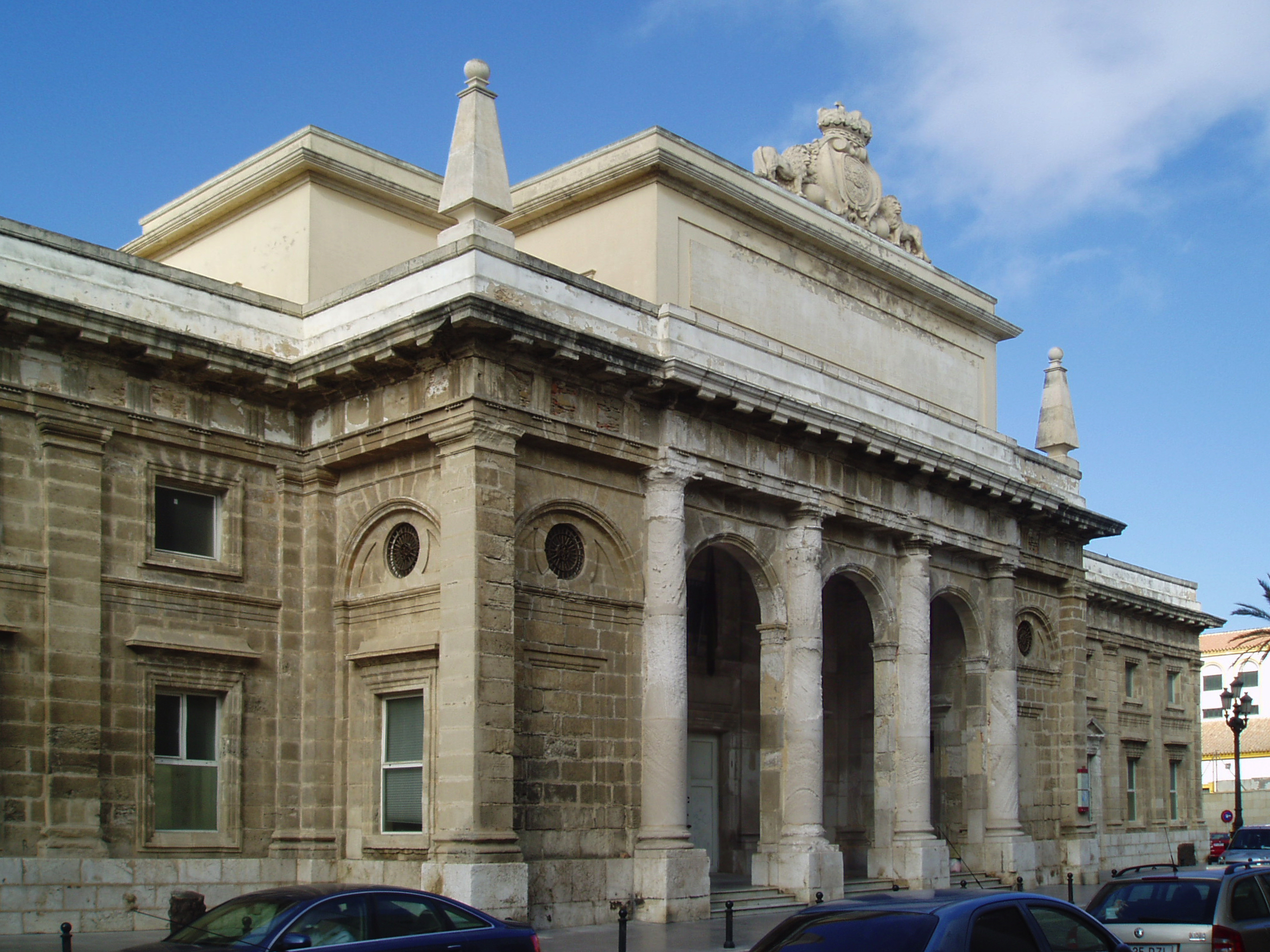 Cárcel Real de Cádiz, de estilo neoclásico.